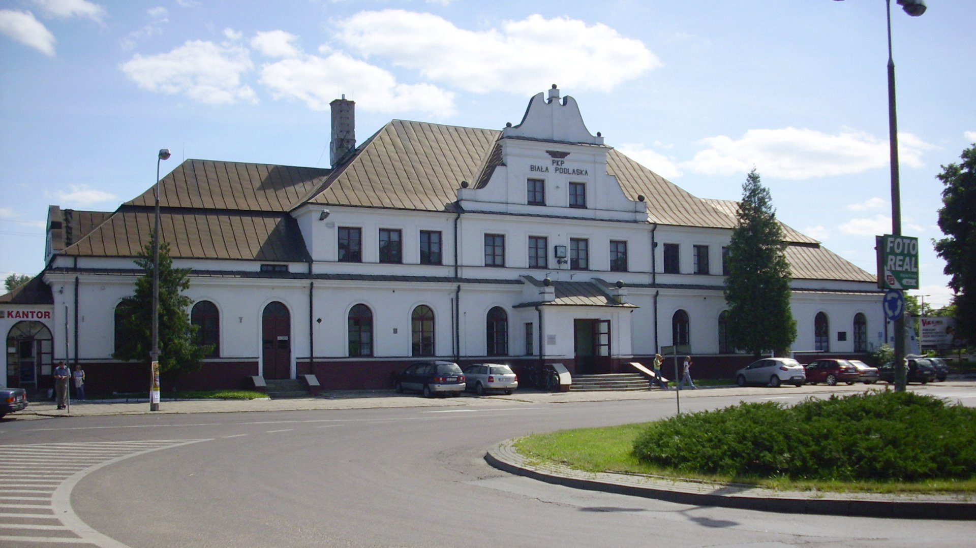 Biała Podlaska - zespół dworca kolejowego (1867-1868,1928) - dworzec - widok od strony miasta (zabytek nr. A/771 z 22.05.1998)